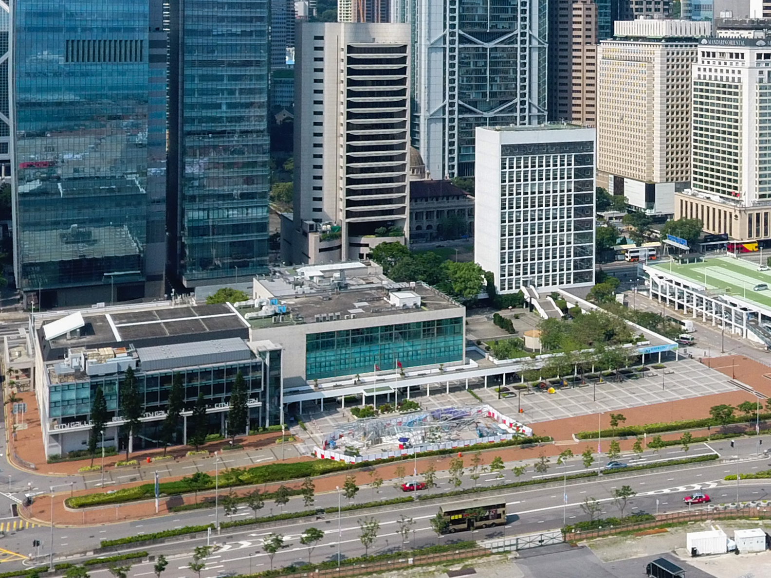 Hong Kong City Hall